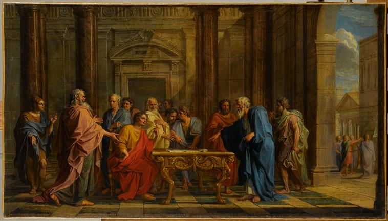 Noël Coypel, Solon soutenant la Justice de ses lois contre les objections des Athéniens, huile sur toile, 500 x 870 cm, Musée du Louvre